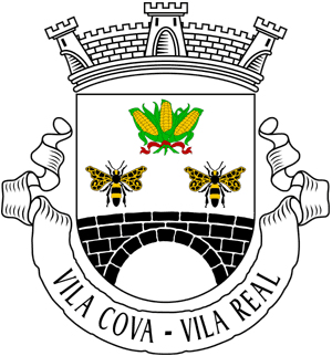 Brasão da freguesia de Vila Cova (concelho de Vila Real)